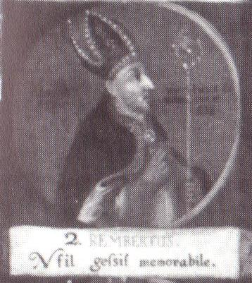 Rembert von Hildesheim; Nihil gessit memorabile - "Er vollbrachte nichts Erinnernswertes"